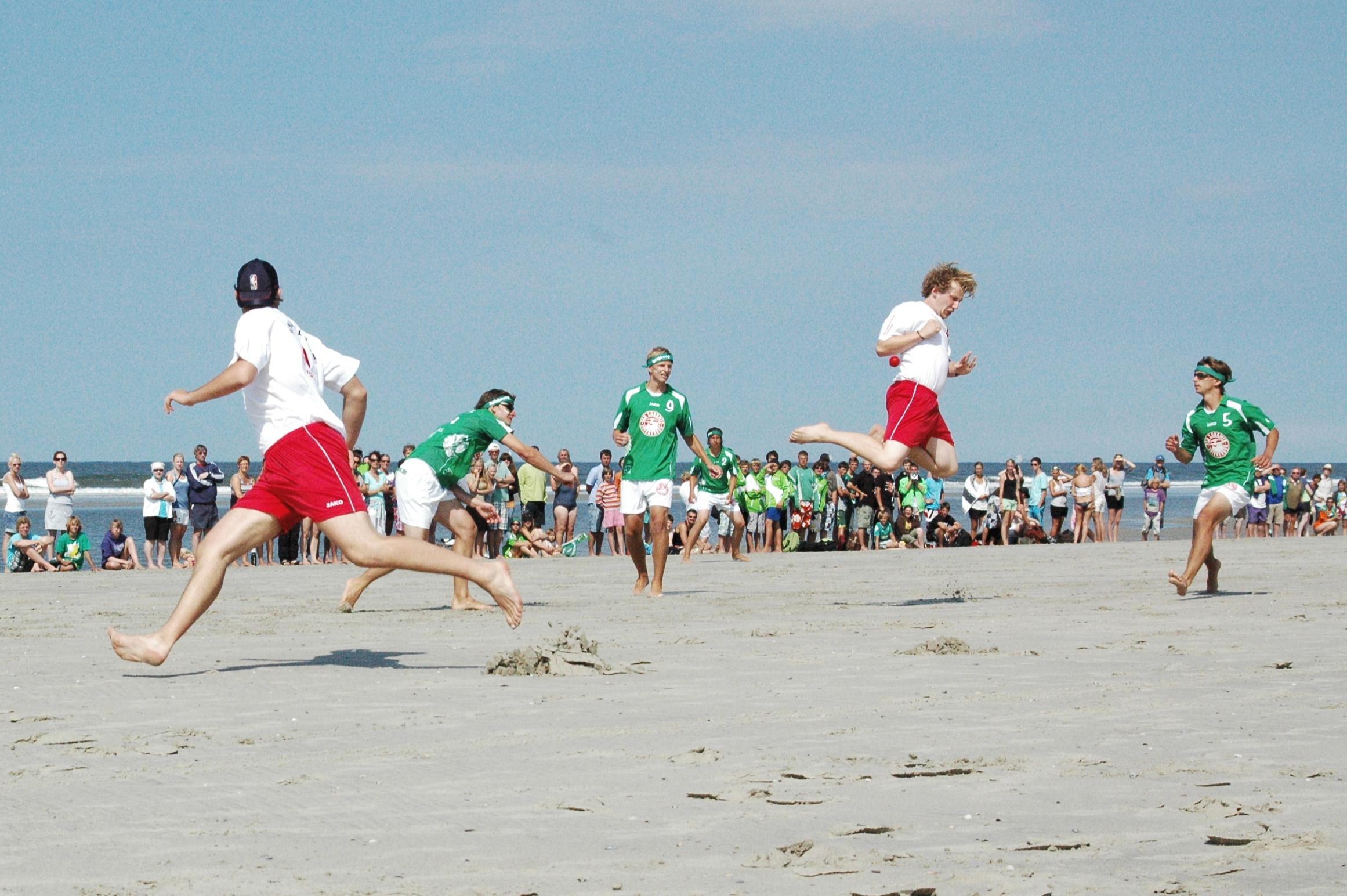 Schlagball-Spiel am Strand in Spiekeroog beim Inselturnier zwischen Spiekeroog (grüne Trikots) und Langeoog.